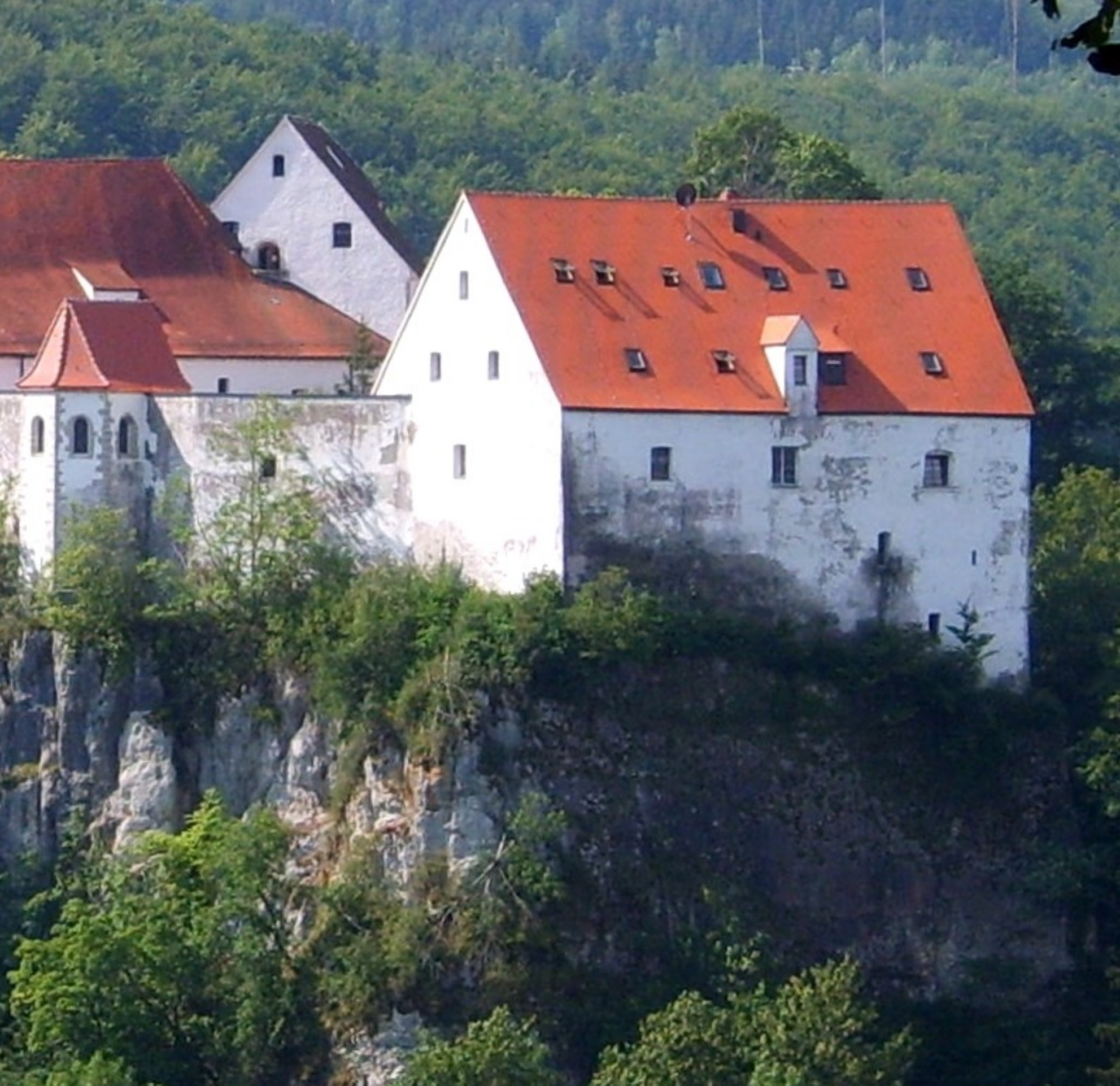 Burg Wildenstein Burg Wildenstein Palas und Burgkapelle auf bündig abgebrochenem und teilweise glatt geschliffenem Felsunterbau.